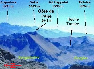 Vue légendée du chaînon de la Pointe de la Côte de l'Ane (2916 m) dans les Alpes Maritimes (06 - FRANCE). Photographie prise le 22/08/2006 depuis le Mont Pelat (3050m) situé à l'est.